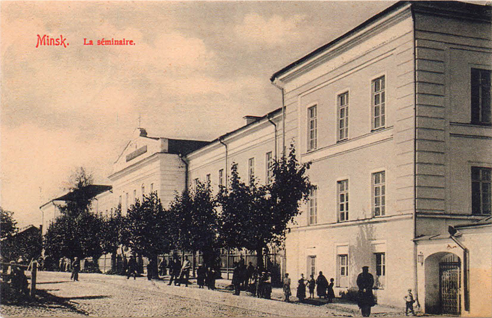 Беларуская (тарашкевіца): Менск (Miensk), Траецкая гара (Trajeckaja hara). Касьцёл і шпіталяь сясьцёр міласэнасьці (шарытак)